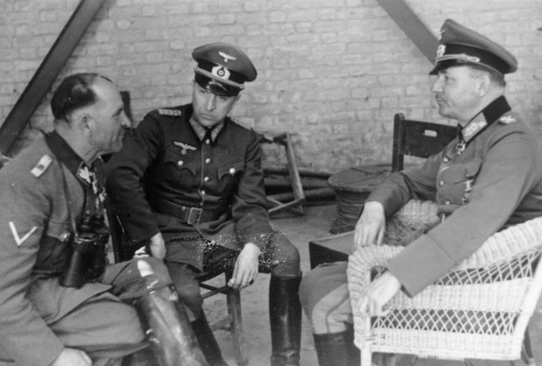 Südost-Front: Vorverhandlungen über die Kapitulation der griechischen Armee. Generalfeldmarschall List, Generalmajor von Greiffenberg und SS-Obergruppenführer Sepp Dietrich. PK-Röder - Scherl Bilderdienst 4778-41 April 1941